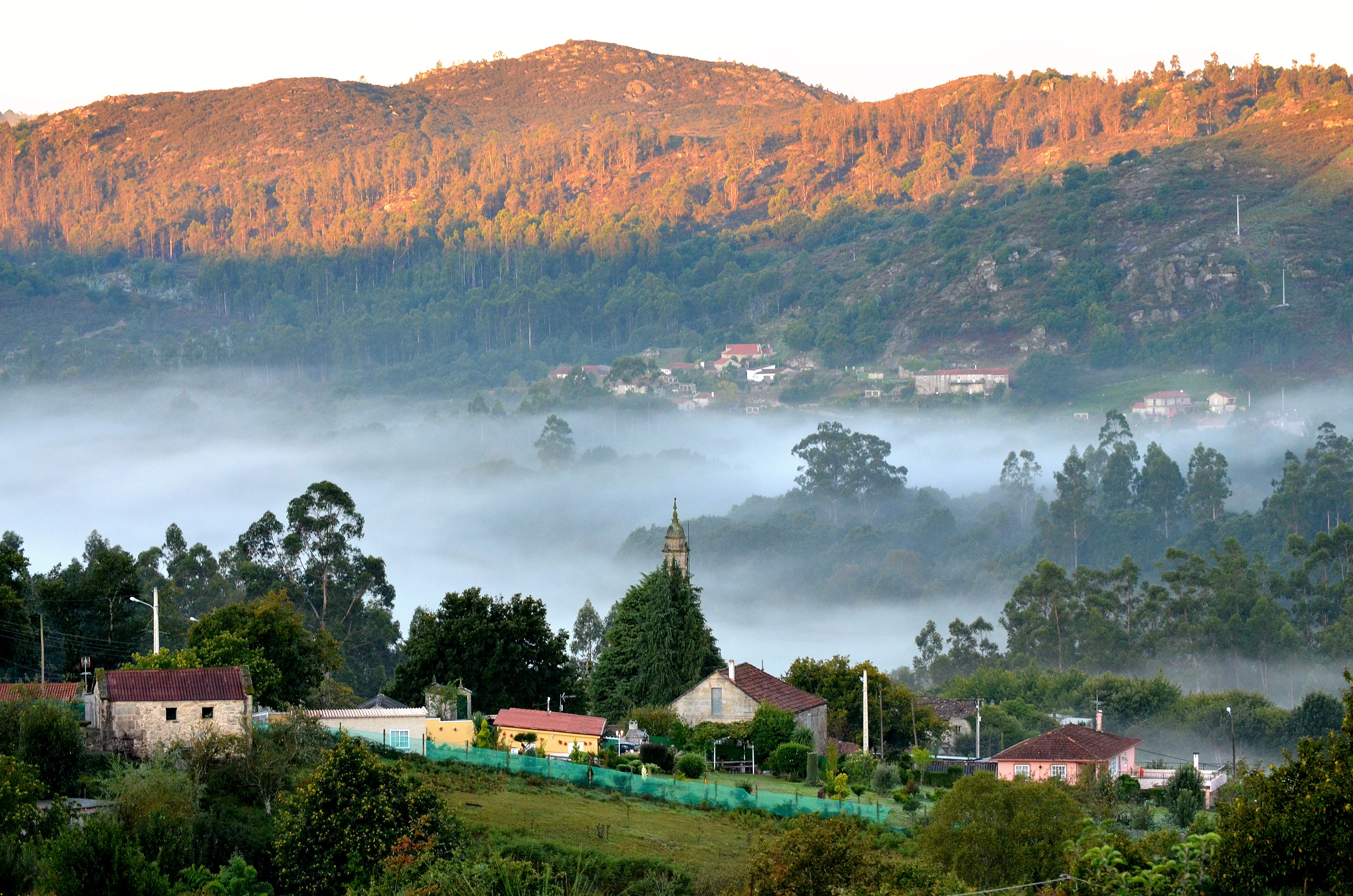 Amanecer en Valongo